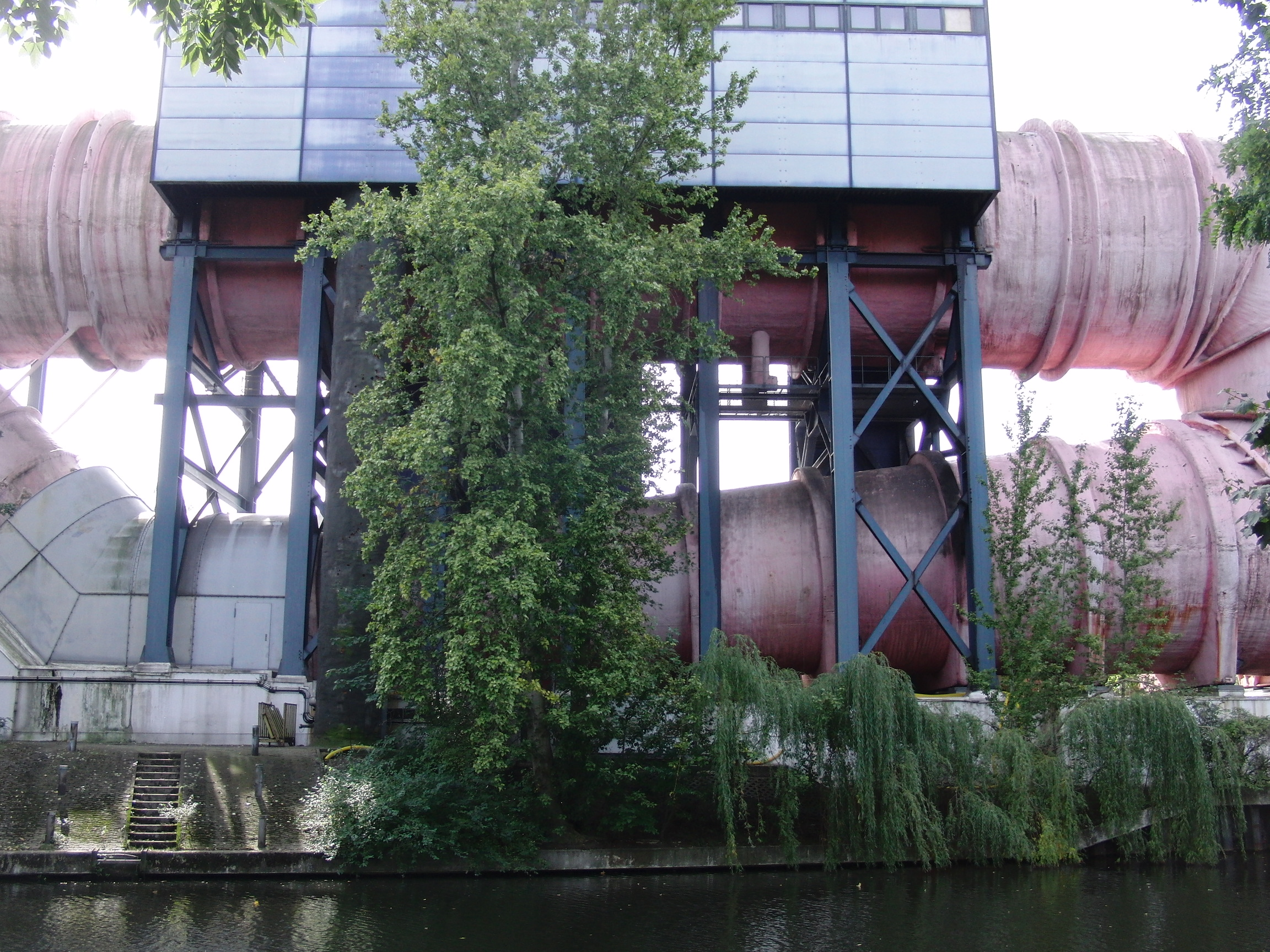 Versuchsanstalt für Wasserbau und Schiffsbau, Schlepprinne 1903-04; Institutsgebäude, 1928-30; Umlaufkanal, 1975-76 von Ludwig Leo